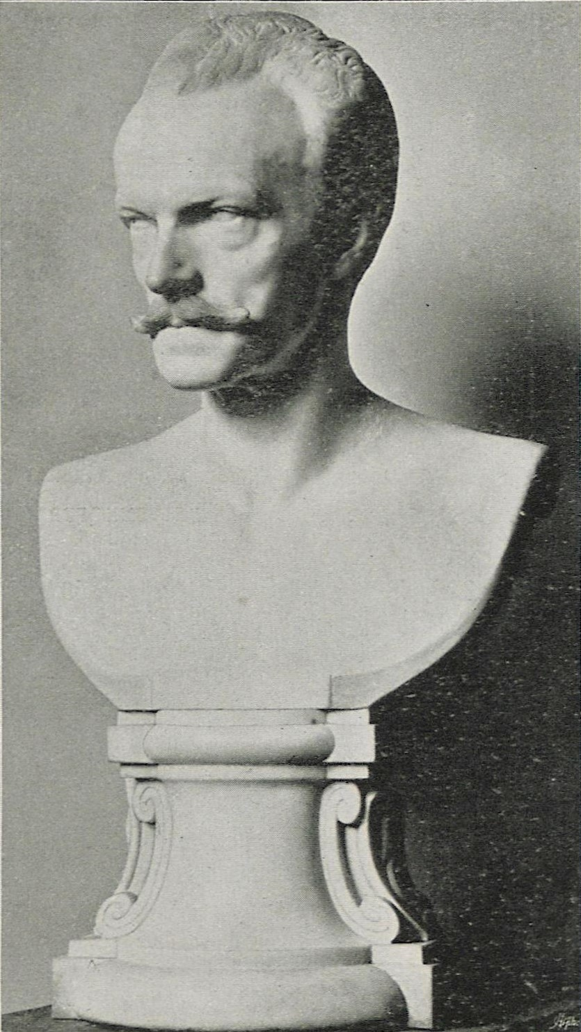 Adolf von Hildebrand: Bildnisbüste Karl Theodor Herzog in Bayern